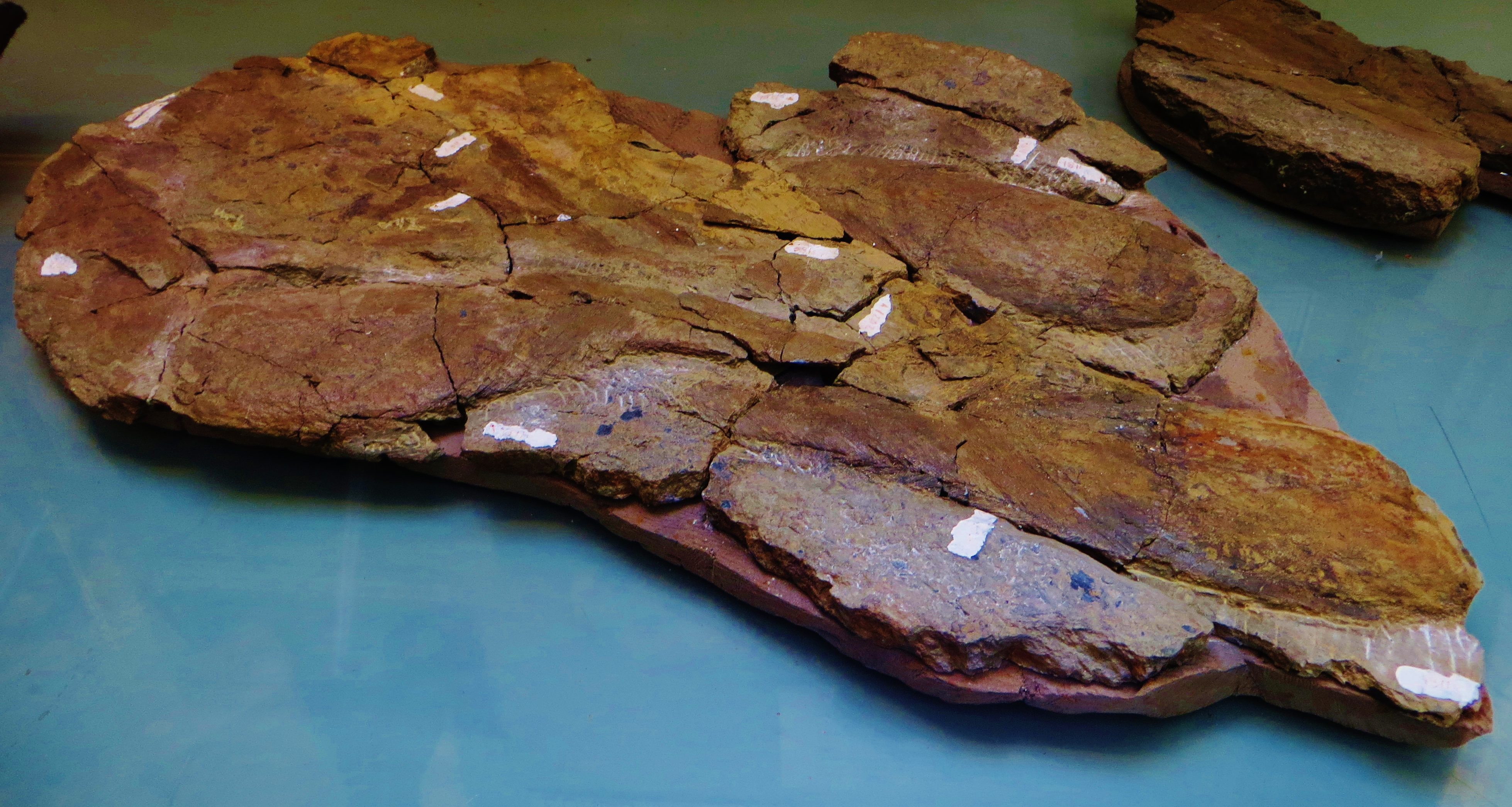 Fossil of Sacabambaspis, an extinct fish- Took the photo at Musee d'Histoire Naturelle, Paris